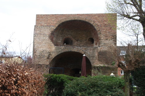 Pletzergassenturm in der Hohenzollernstr. in Düren